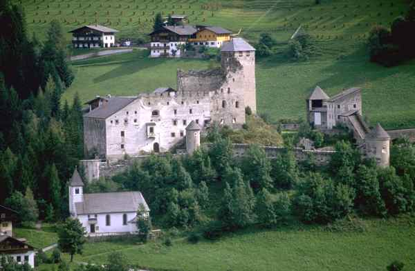 Burg Heinfels in Panzendorf andere Versionen: ...